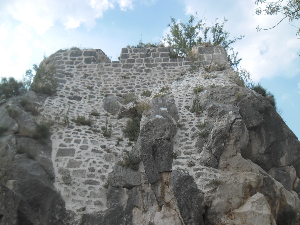 proslava Dana pobjede i domovinske zahvalnosti (20. obljetnice vojno-redarstvene operacije Oluje) u Kninu 5. kolovoza 2015.